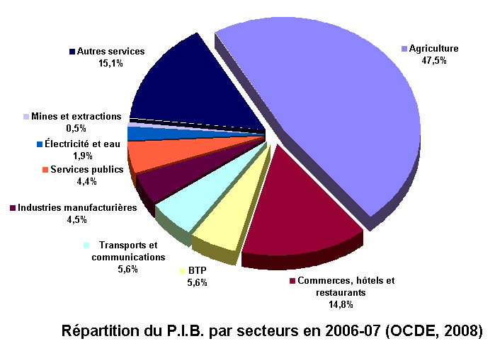 Ventilation sectorielle du PIB en 2006/07 (en pourcentage) (Données issues de OCDE, « Perspectives économiques en Afrique 2008 », mai 2008, p. 303-316 Template:Lire en ligne